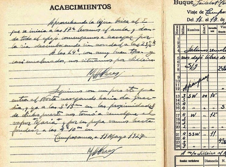 Entradas en el diario de navegación del Constantino Candeira, de Vigo a Camposancos.